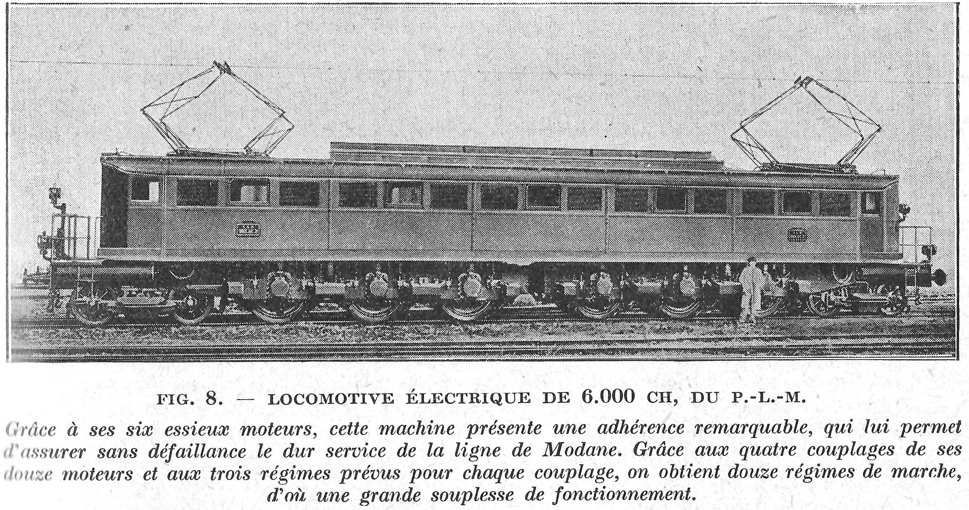 Foto met tekst uit het tijdschrift "La Science et la Vie" van 1932. Is beeld van de eerste type elektrisch locomotief op de maurienne spoorlijn.